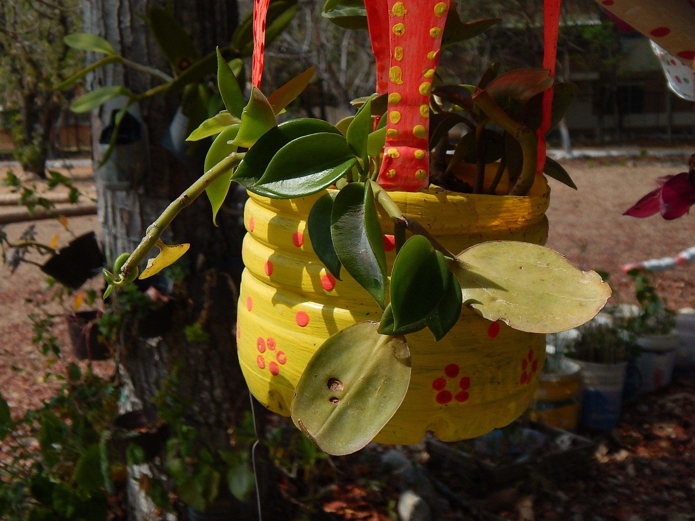 Manualidad en el parque